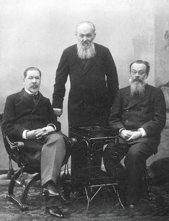 Слева направо: В.П.Буренин, А.С.Суворин, Н.Гей (Богдан Вениаминович Гей, ?-1916)